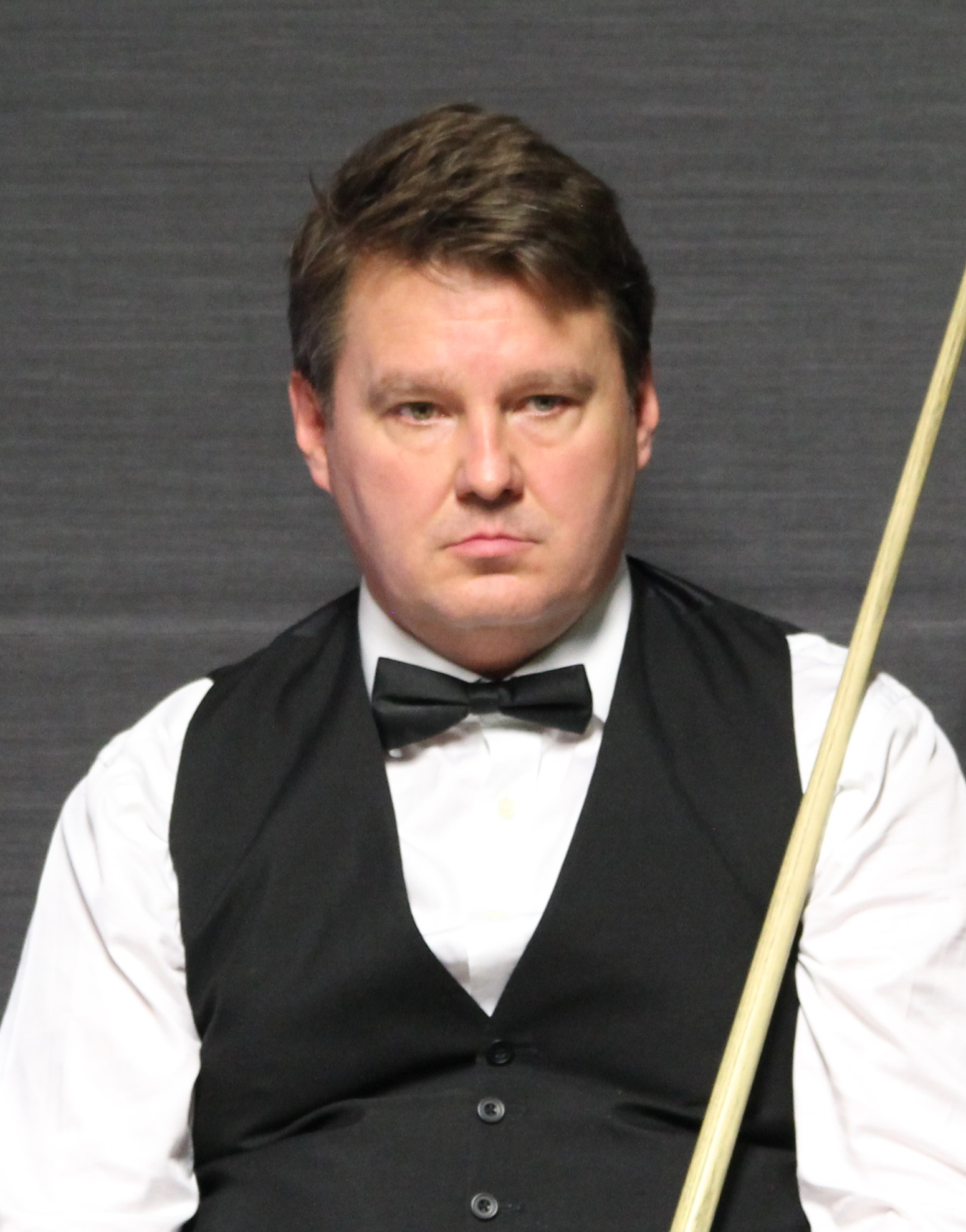 Jason Weston beim Paul Hunter Classic 2016